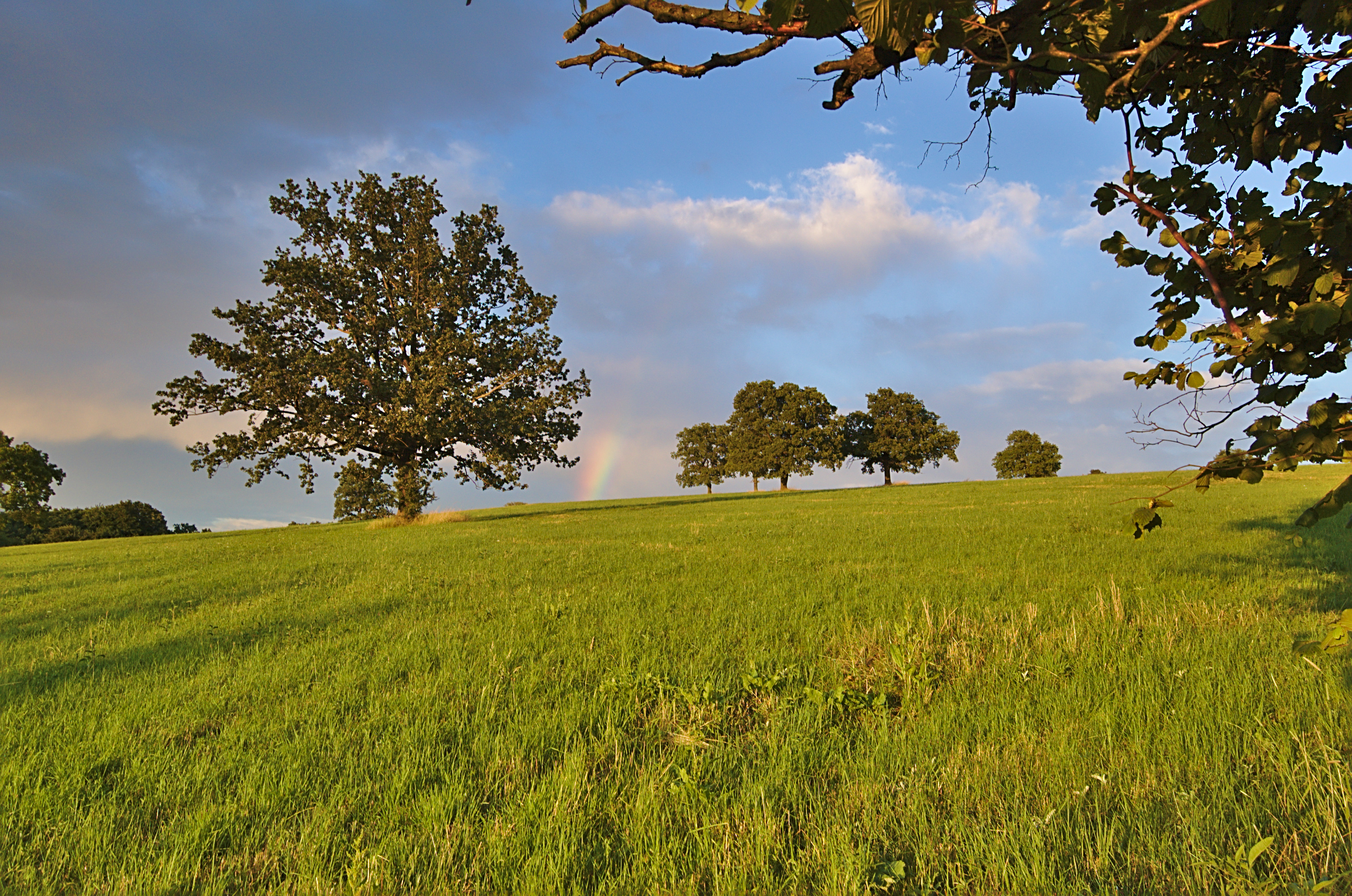 Přírodní rezervace Dolnoněmčanské louky, okres Uherské Hradiště